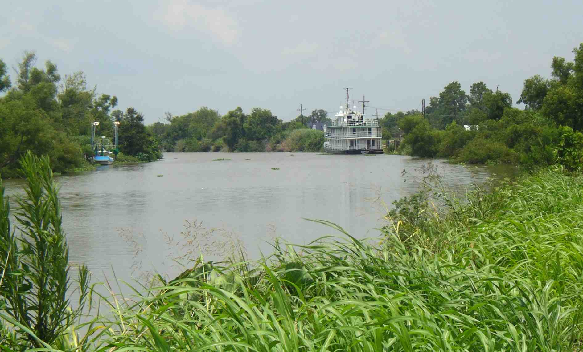 Bayou Lafourche im Mississippi-Mündungsdelta